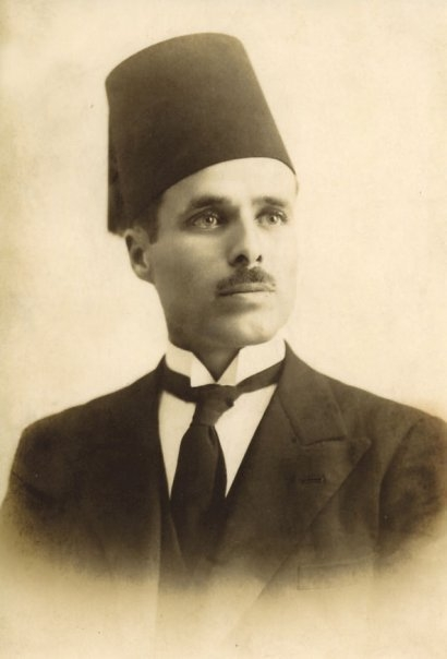 Portrait officiel de l'avocat Habib Bourguiba, futur président de la Tunisie